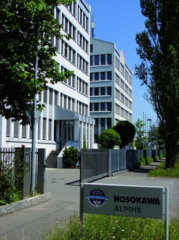 Hosokawa Alpine-Zentrale, Augsburg